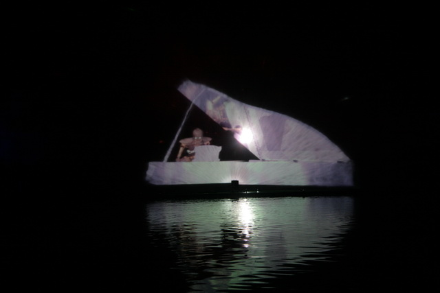 Фото Юрій Басюк